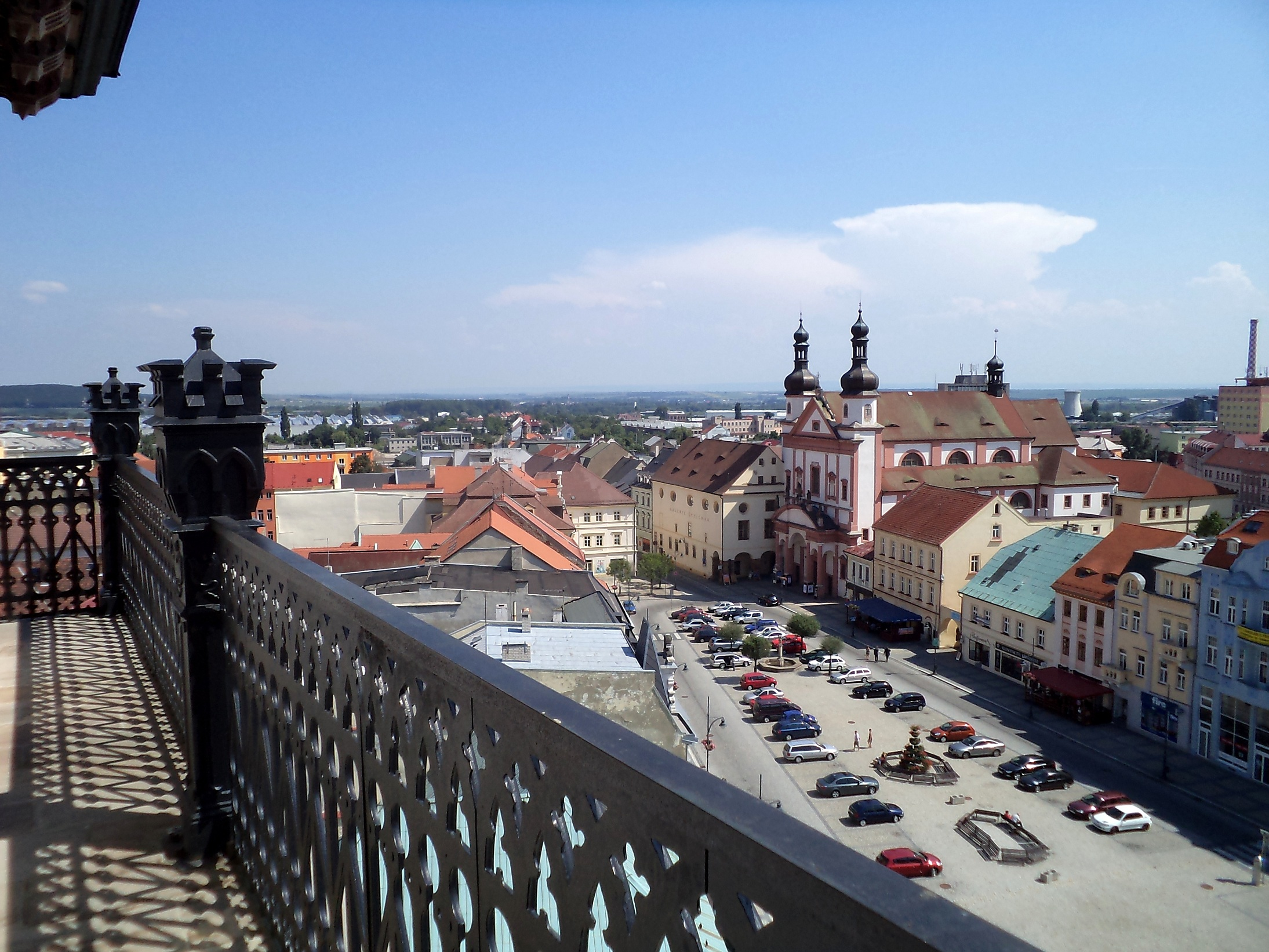 Chomutov - Náměstí 1. Máje z městské věže